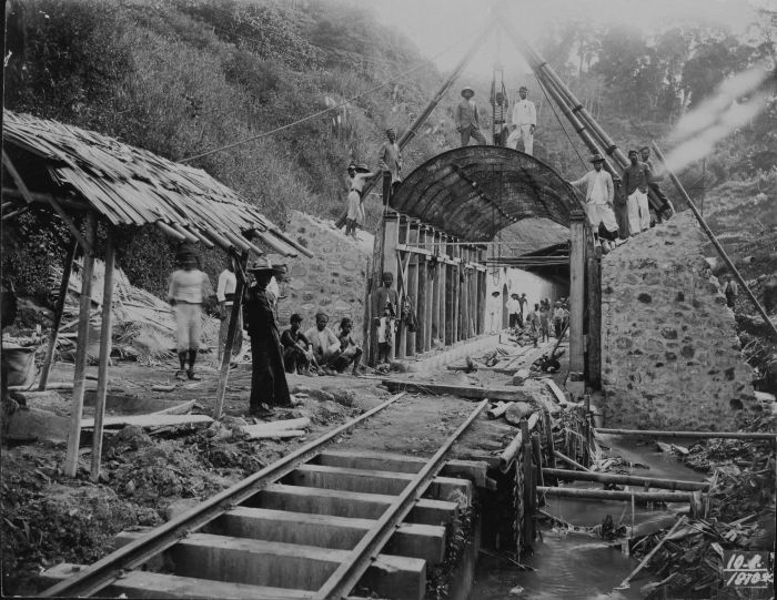 foto. Arbeiders poseren bij een in aanbouw zijnde spoorwegtunnel in de bergen